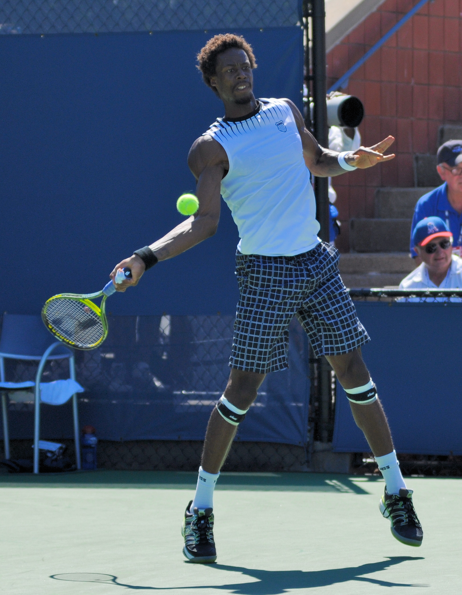 Gael Monfils - US Open 2010